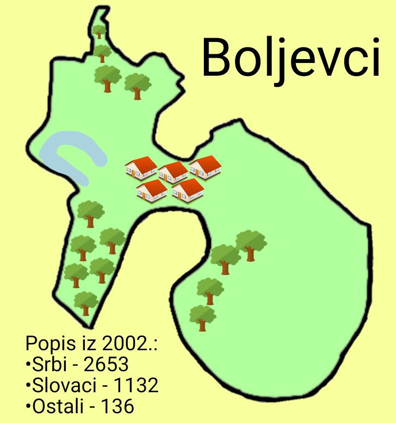 Srpski (latinica): Mapa sela i mesne zajednice Boljevci u Gradskoj opštini Surčin u Beogradu